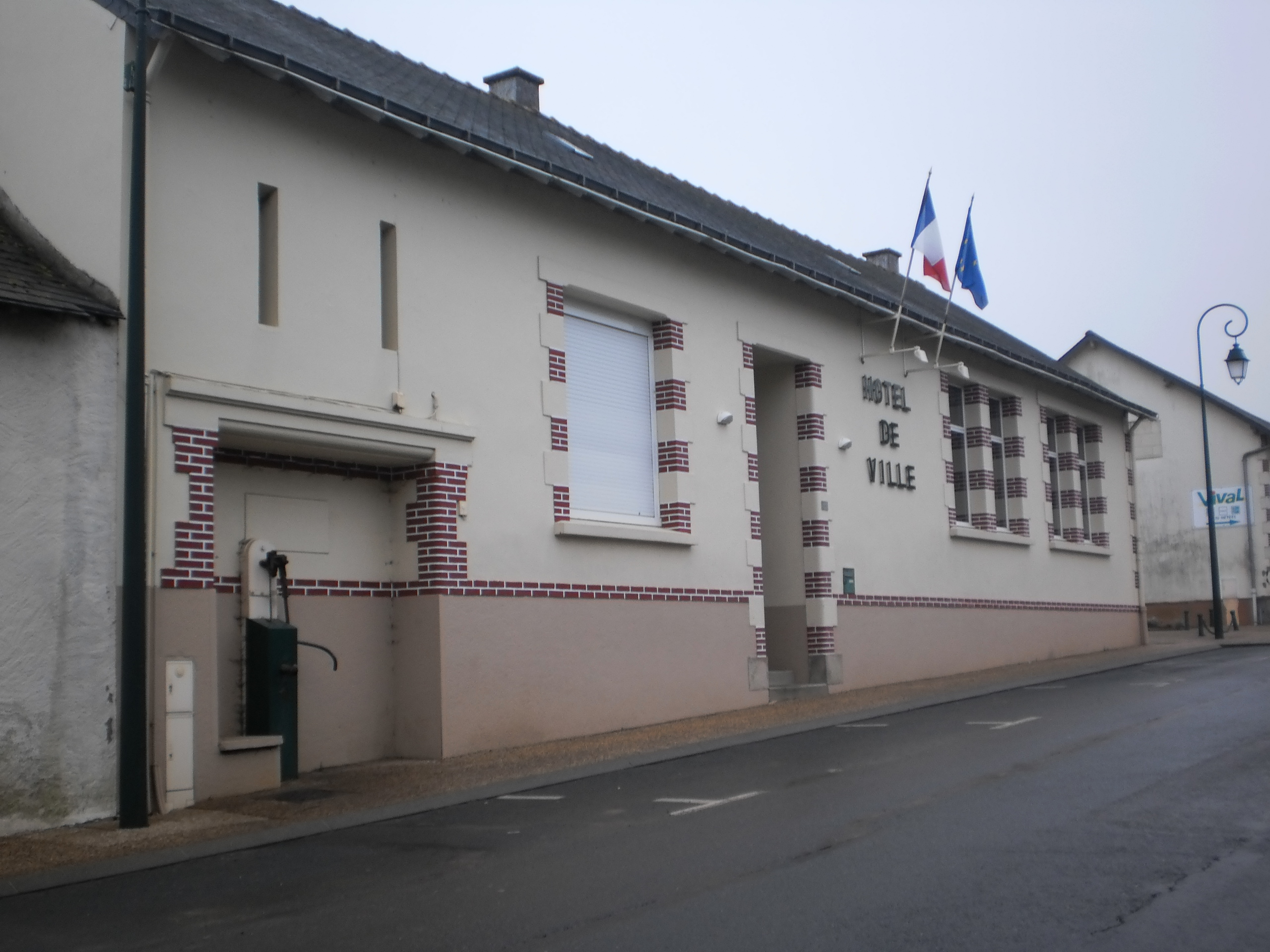 Maumusson - Loire-Atlantique (France) - La mairie